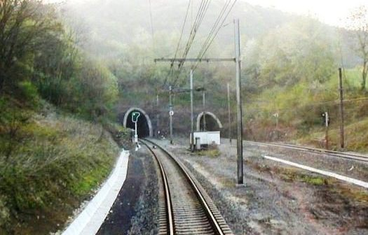 Tunnel vu Voeren.